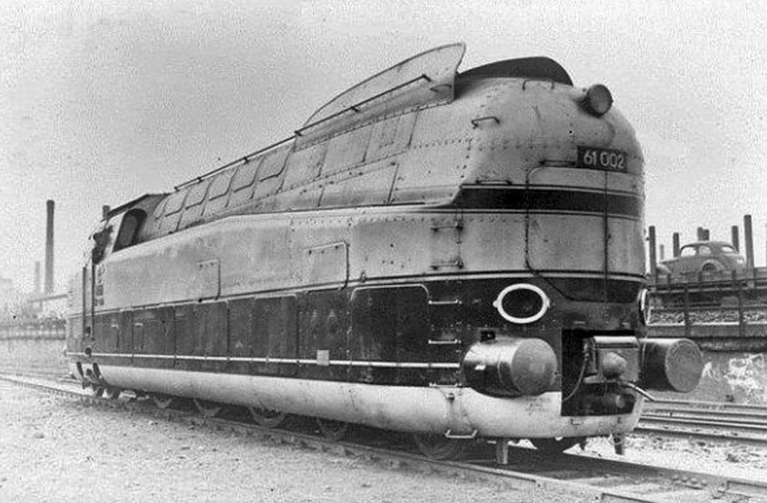 Damplokomotive 61 002 der DR-Baureihe 61 1939 in Dresden